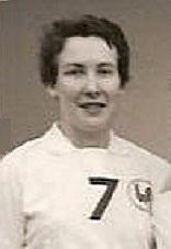 French women's basketball team 1953: Anne-Marie Colchen (#7), Édith Tavert-Kloechner (#9), Gisèle Roques (#3), Alice Sellier (#14), Paulette Neyraud (#12), Andrée Henry-Lucq (#11), Evelyne Golhen (#5), Eliane Savelli (#8), Micheline Bejaud (#13), Jacqueline Biny (#6), Odette Roques (#10), Thérèse Marfaing (#4).